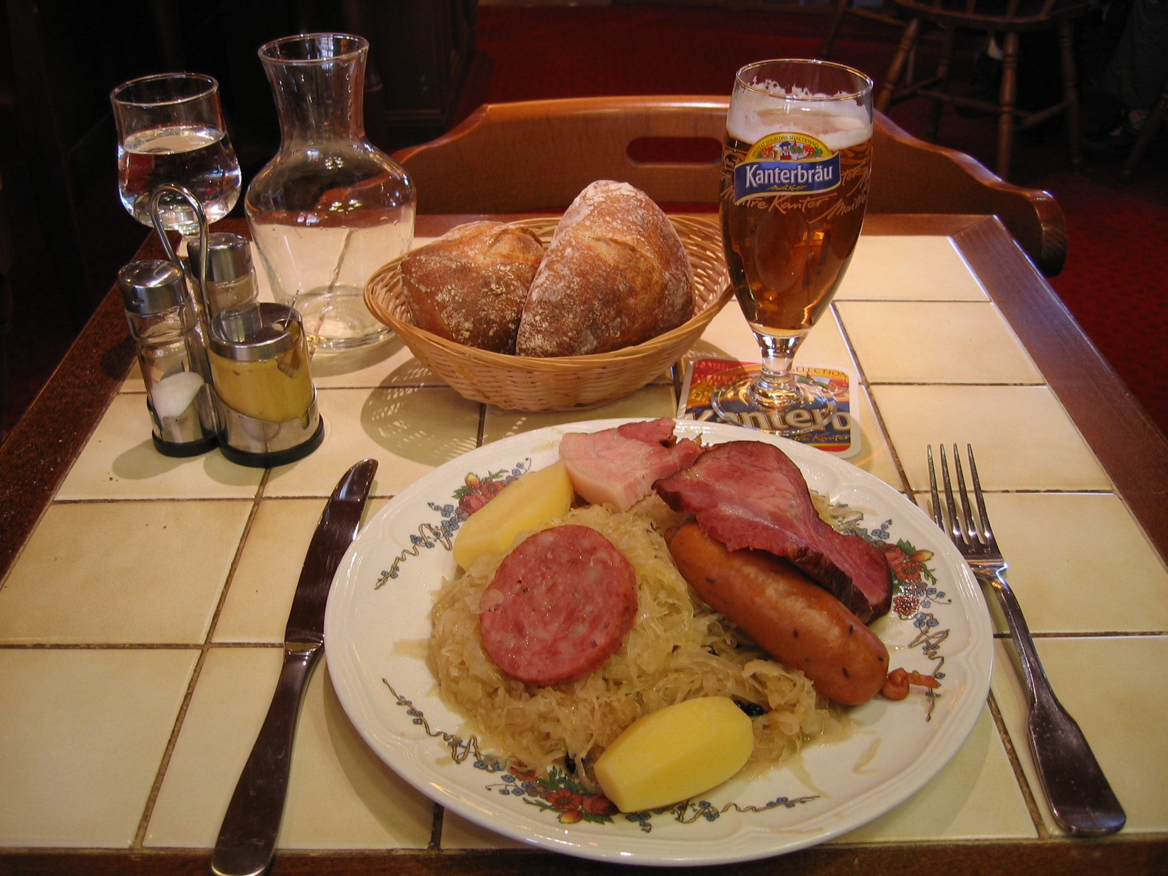 Choucroute